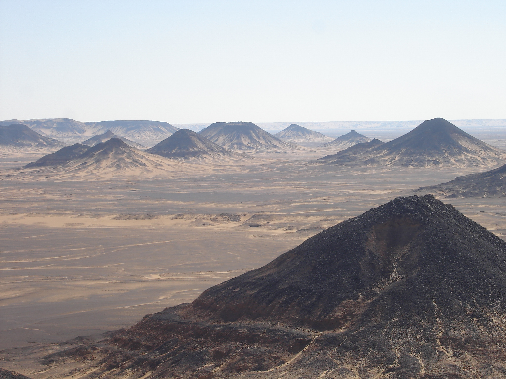 Egypts "black desert".